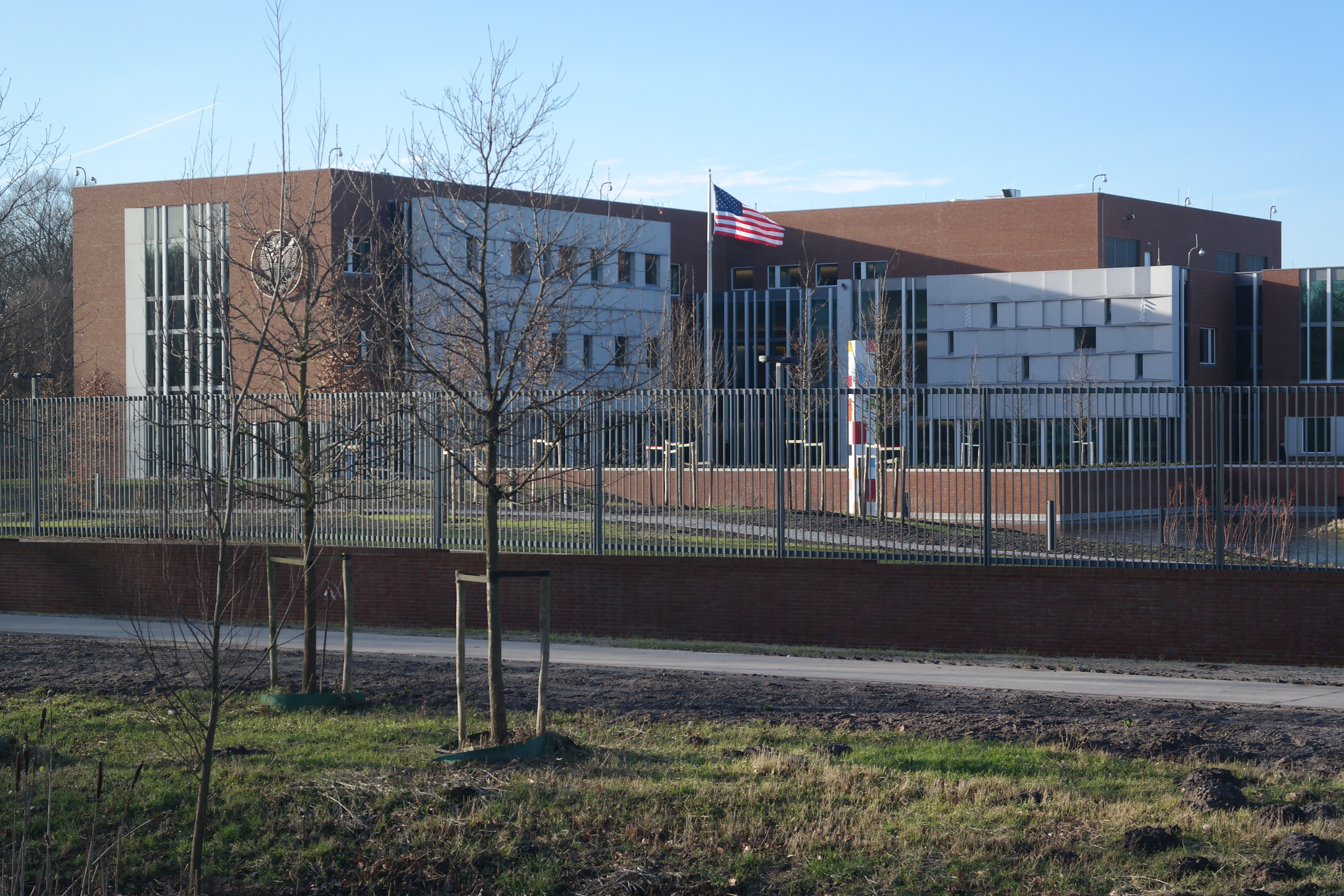 Het nieuwe gebouw van de Amerikaanse ambassade, op de grens van Den Haag met Wassenaar.